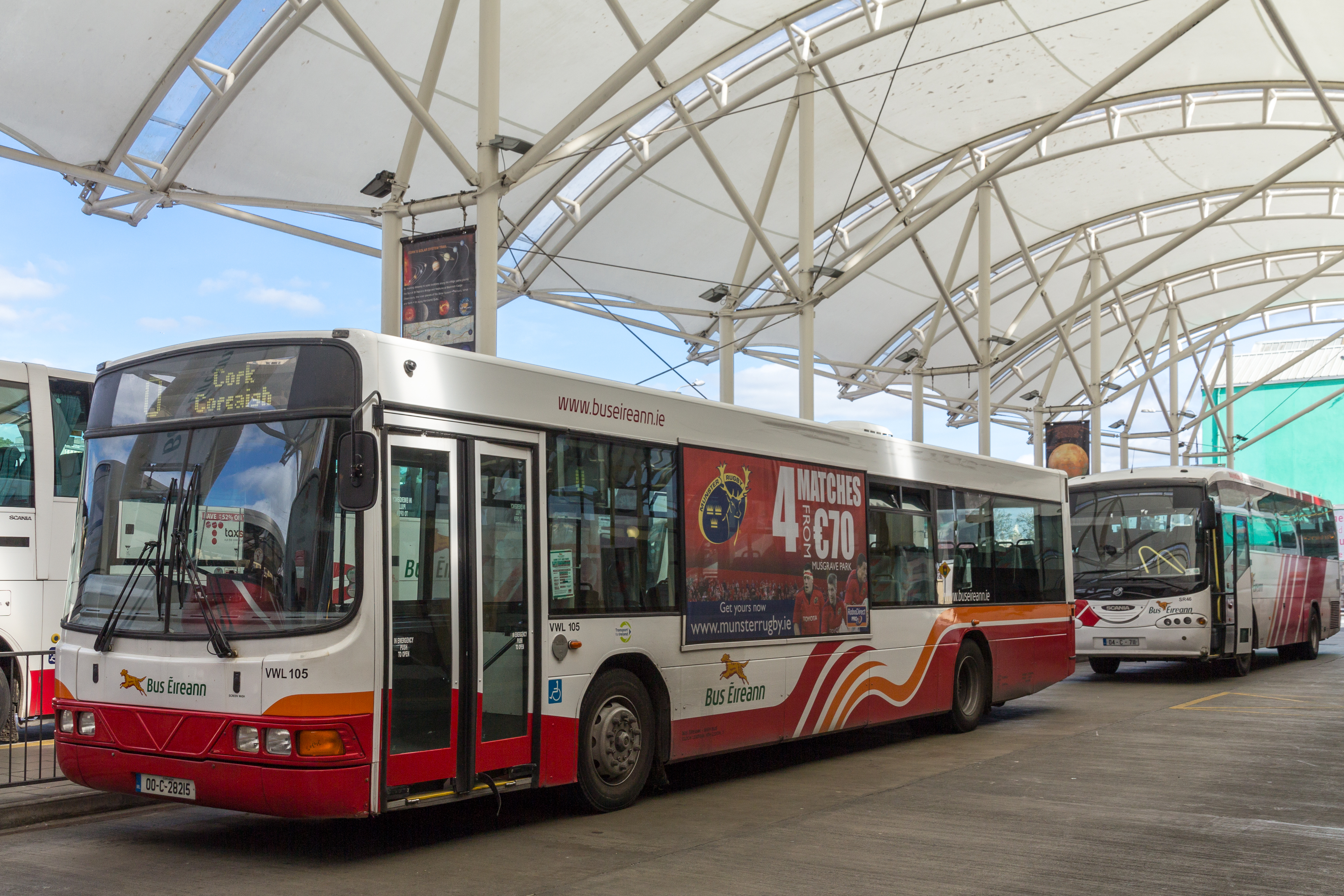 Bus Éireann in Cork: Wright bus (Commander?) auf Basis eines Volvo B10BLE